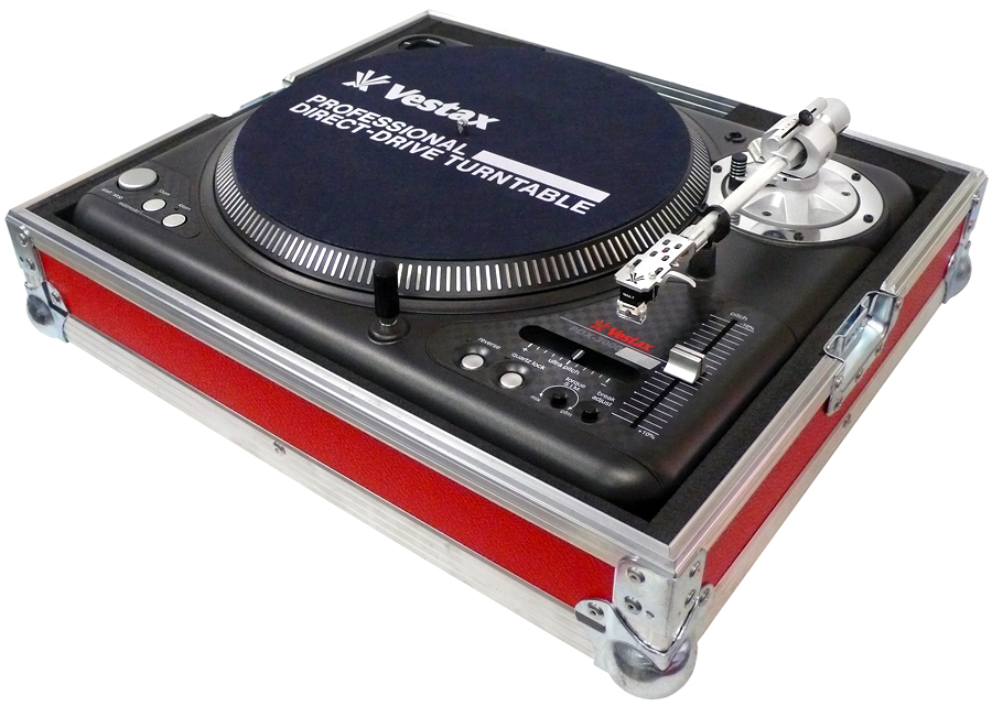 Gramofon Vestax PDX-3000 v hardcase